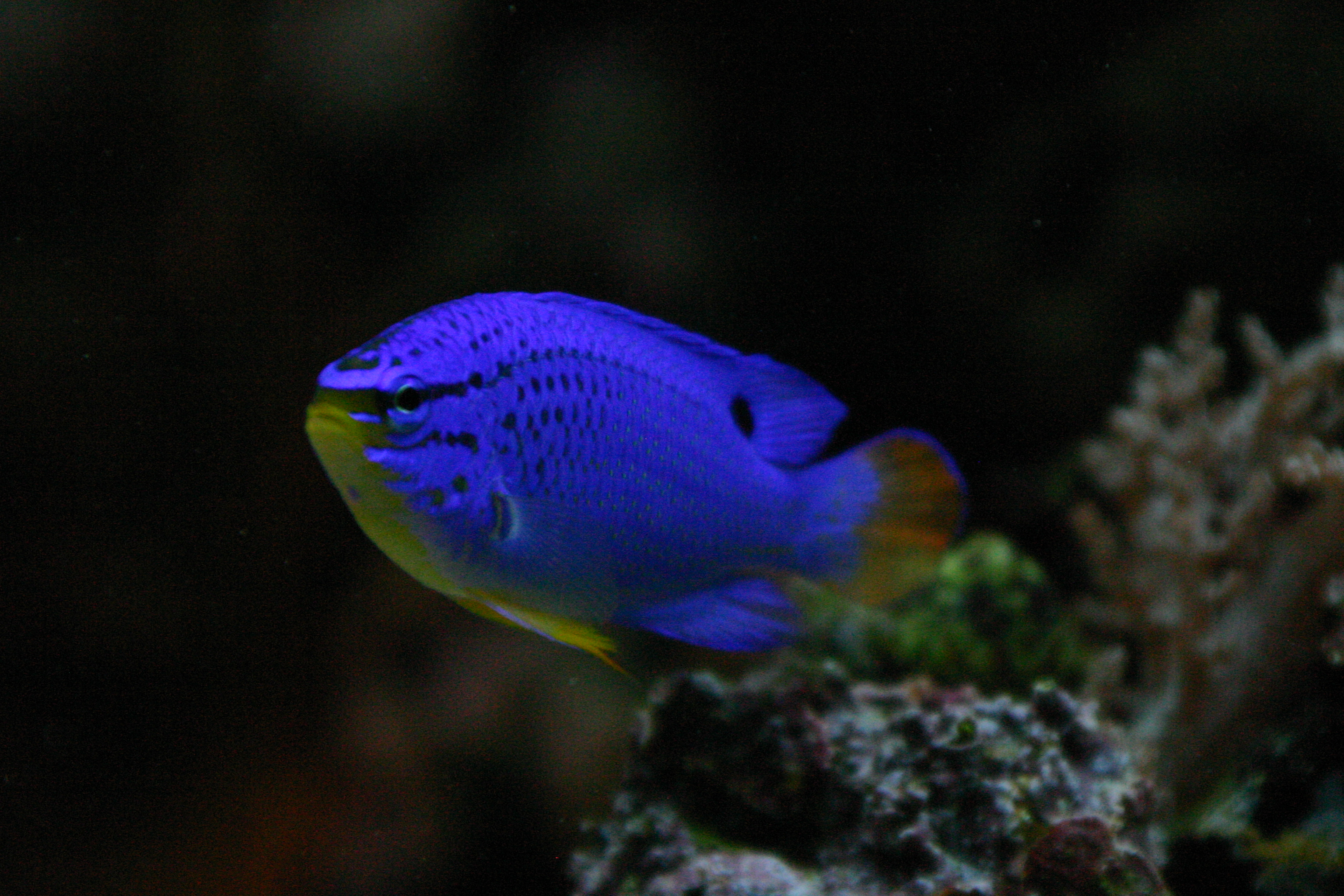 Chrysiptera cyanea en acuario